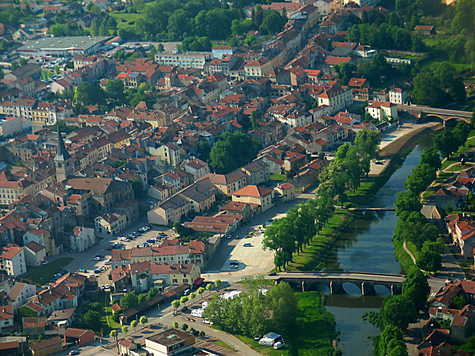 Vue aérienne sur la partie bourg de Mirecourt avec la rivière Madon qui coule sur la ville basse.